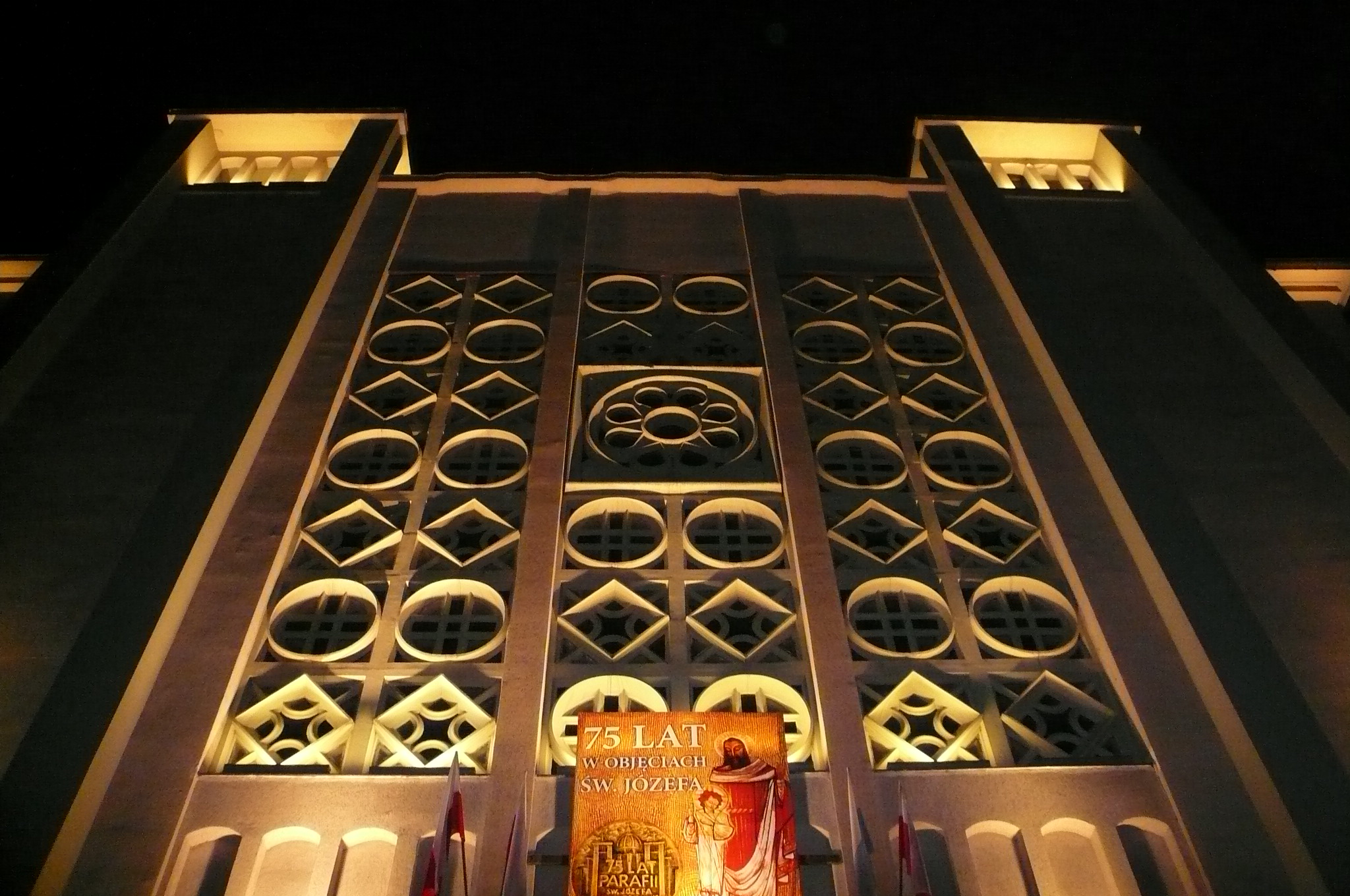 Wielkie okno witrażowe kościoła św. Józefa Oblubieńca Najświętszej Maryi Panny na Kole w Warszawie. Po obu jego stronach widoczne wieże